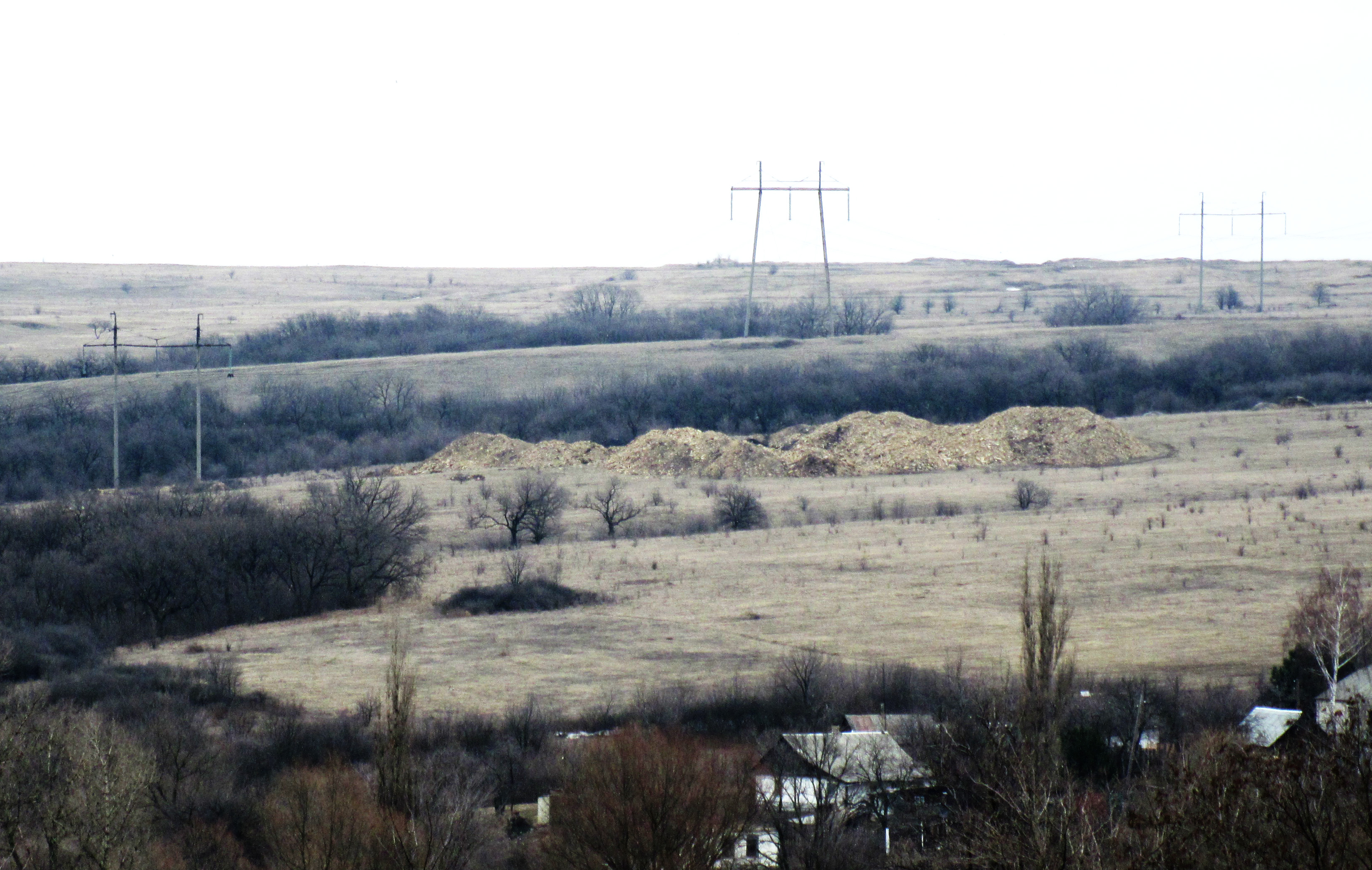 краєвид Перевальського загальнозоологічного заказника (фото з дороги в бік заказника)